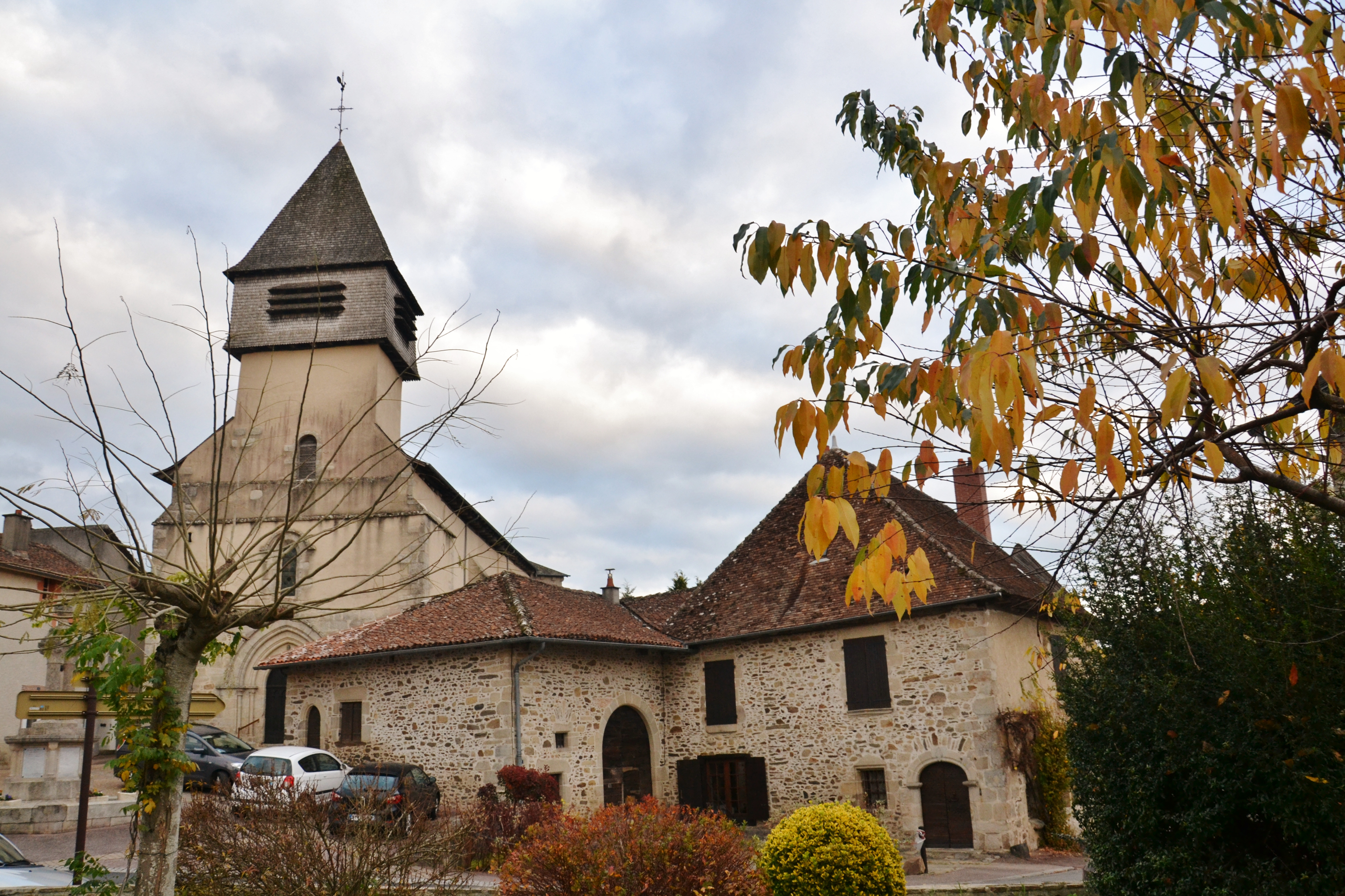 L'église du village de Saint-Paul (Haute-Vienne, France)